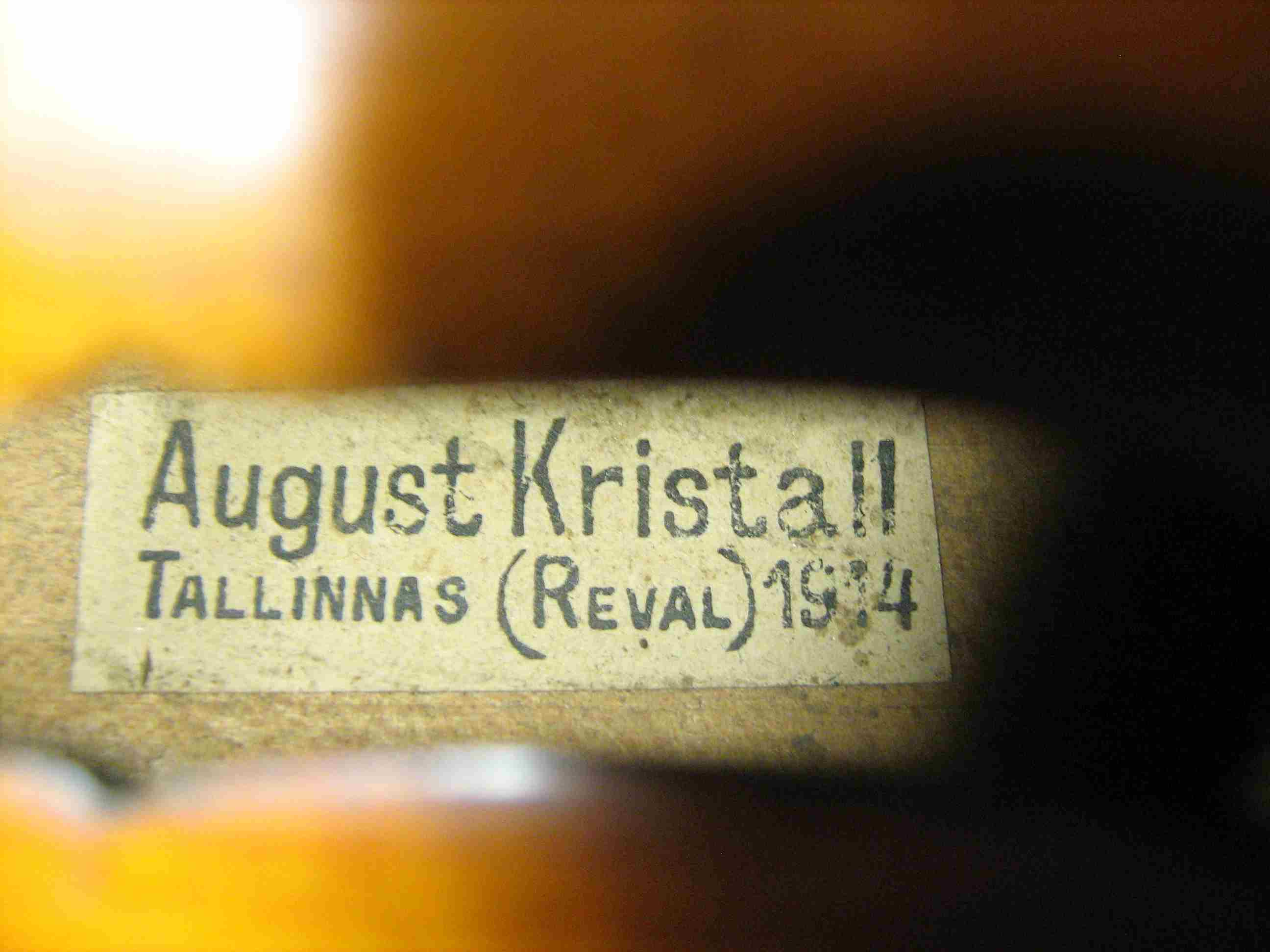 viiul August Kristall Tallinn 1914